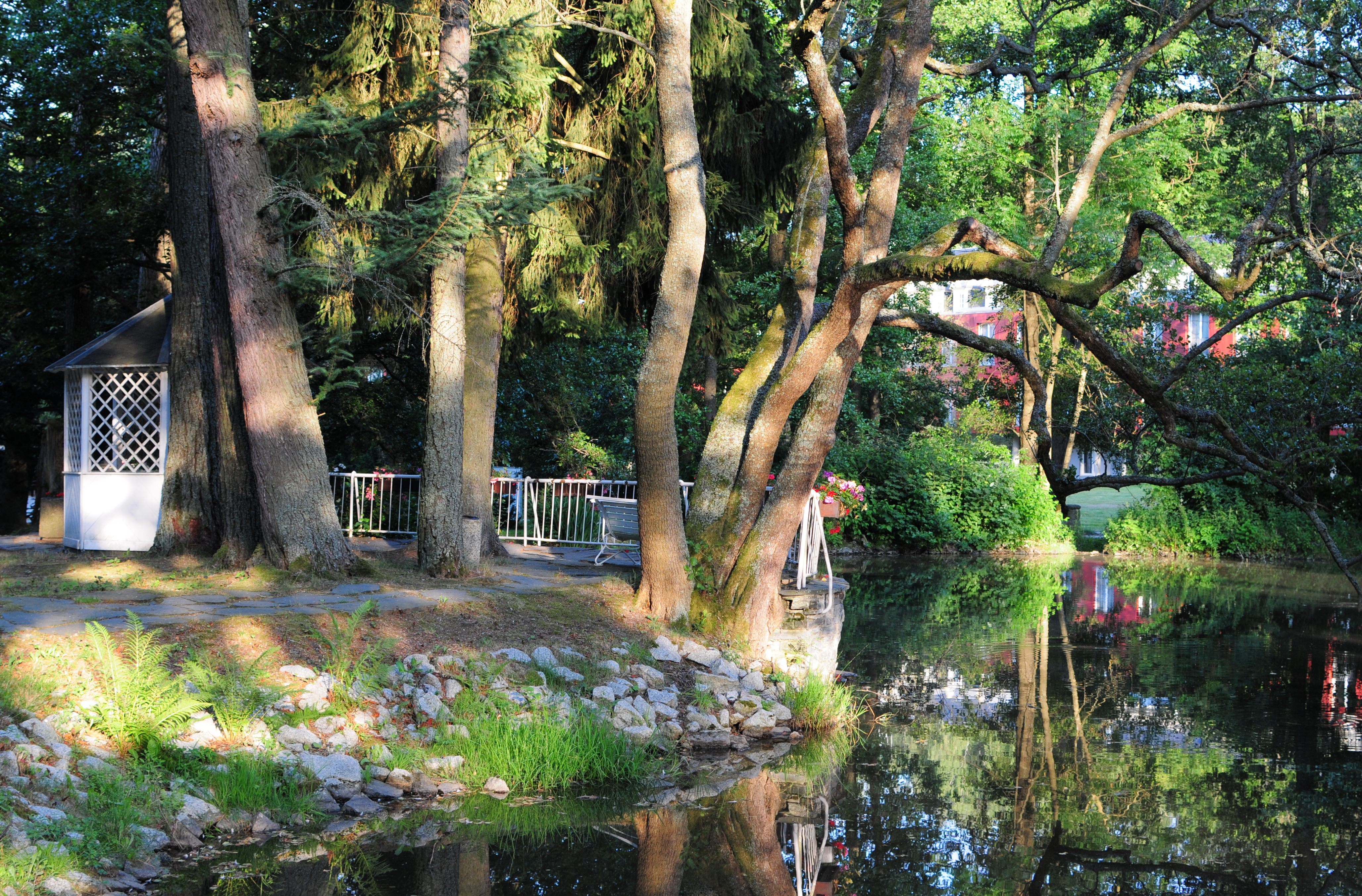 Gemeinde Bad Brambach, Kurpark Bad Brambach mit Teichanlage im englischen Stil (Vogtlandkreis, Freistaat Sachsen, Deutschland)